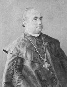 Vincenc Bradáč (1815 - 1874), Český římskokatolický kněz.